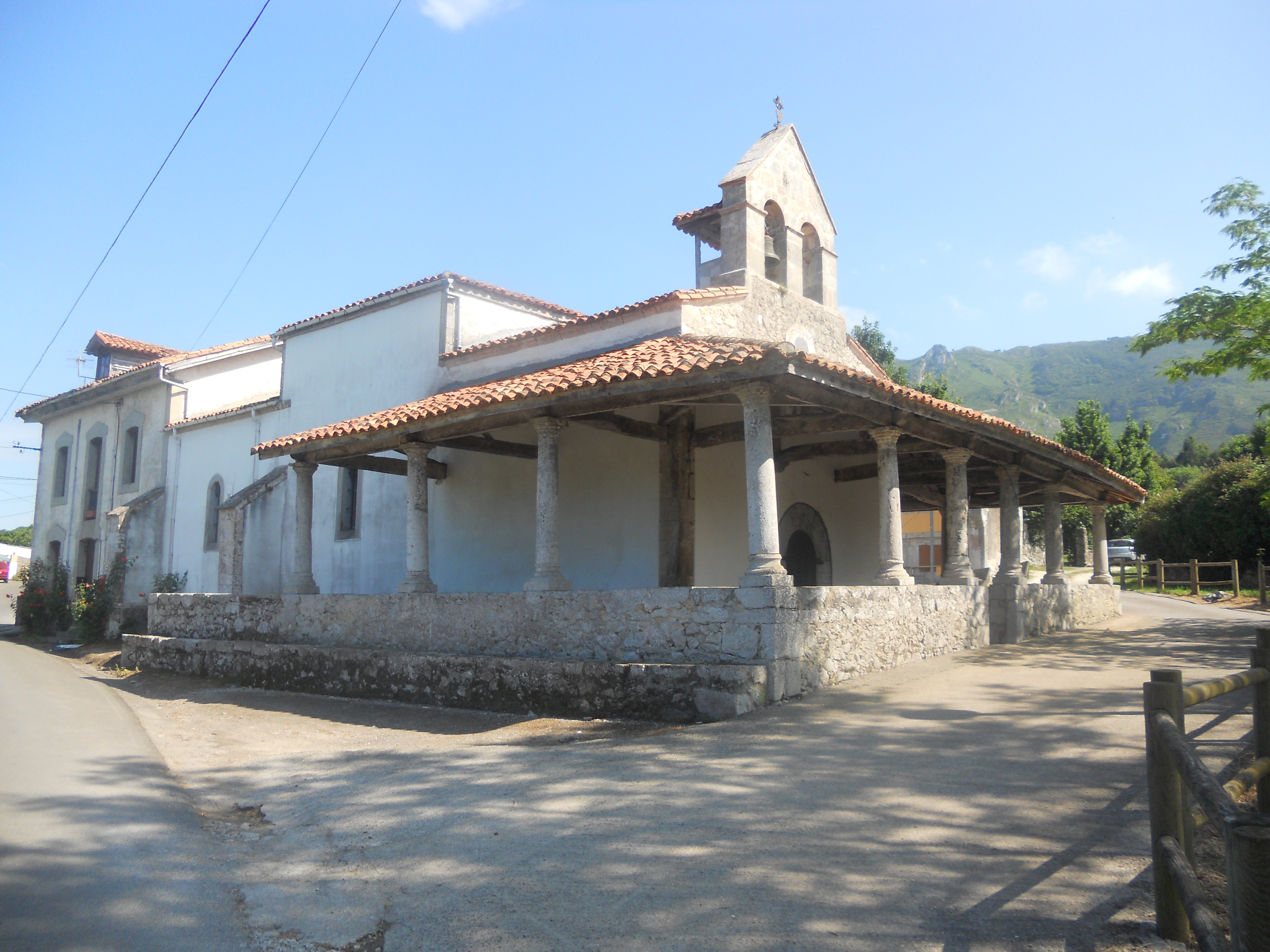 Iglesia de San Mamés , Cuerres, Ribadesella- Asturias.